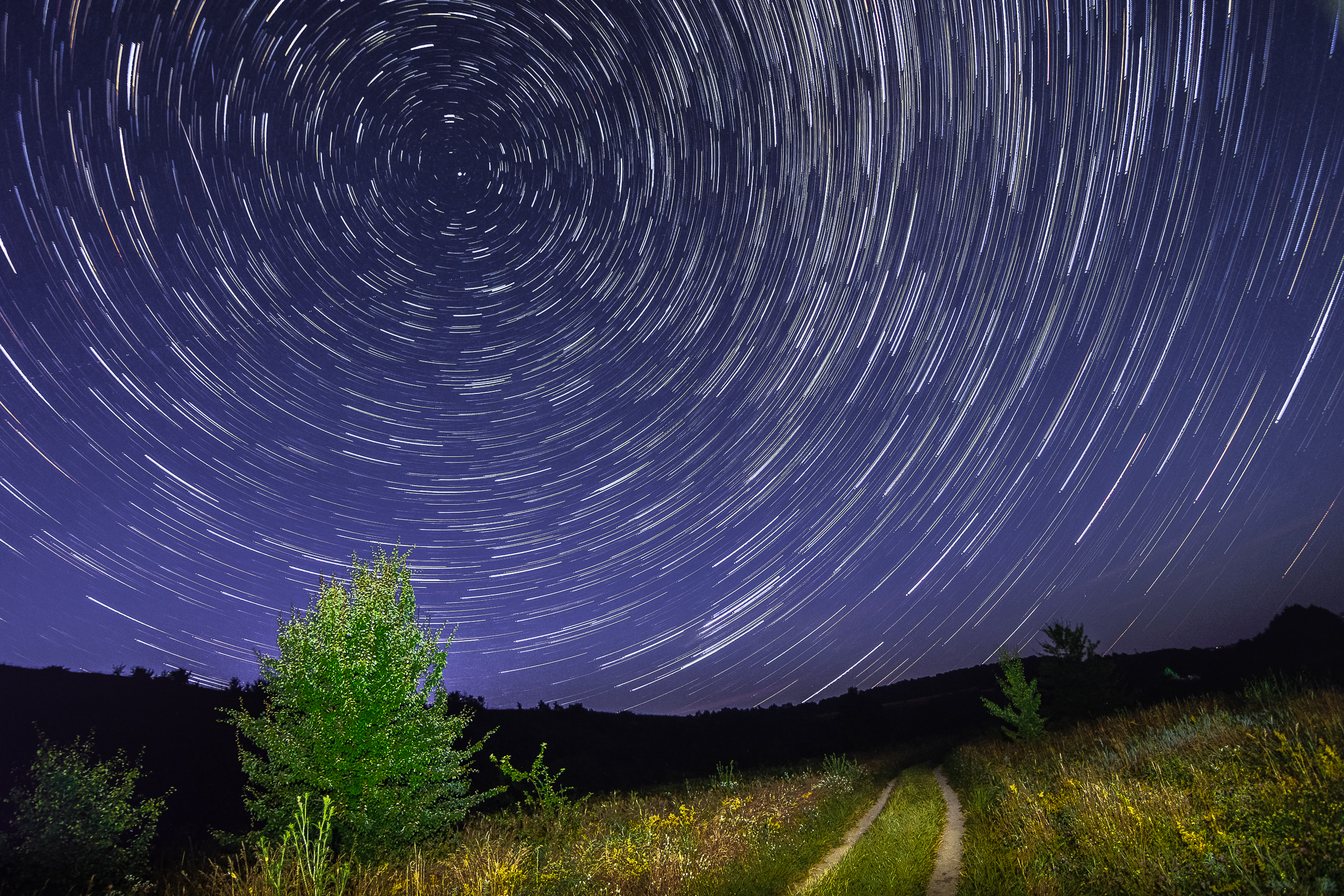 Зоряні треки в околицях с. Самчинці